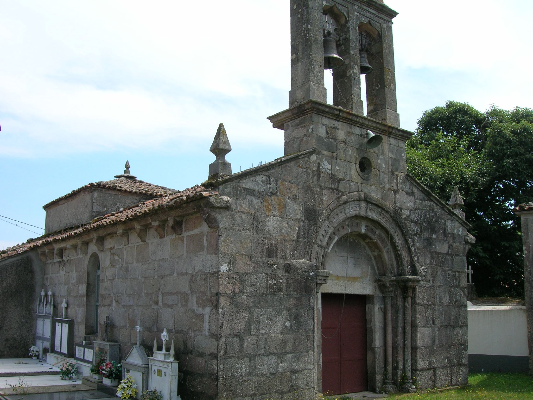 Iglesia románica de finales del siglo XII con reformas posteriores.